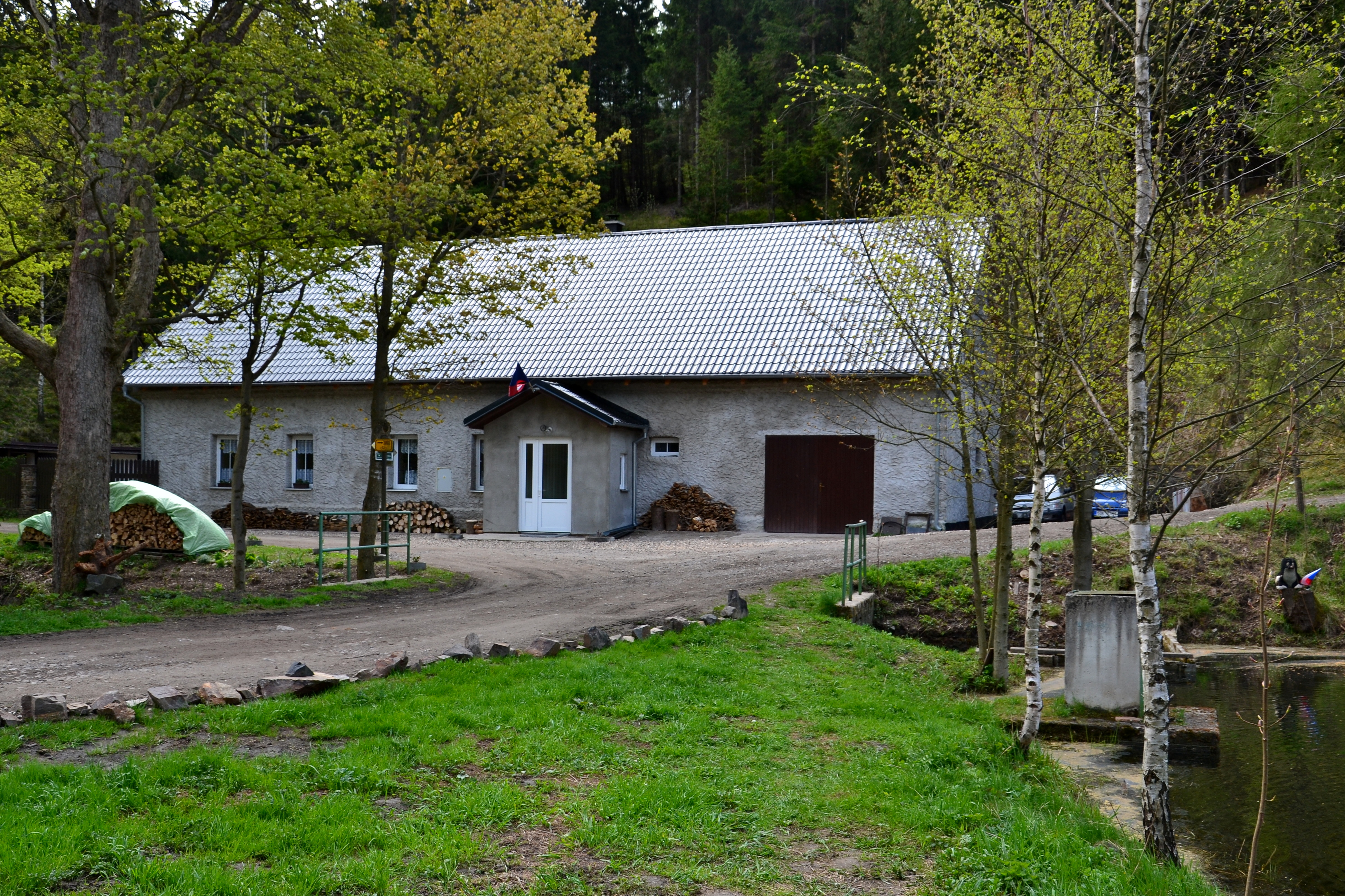 Strážská hájovna